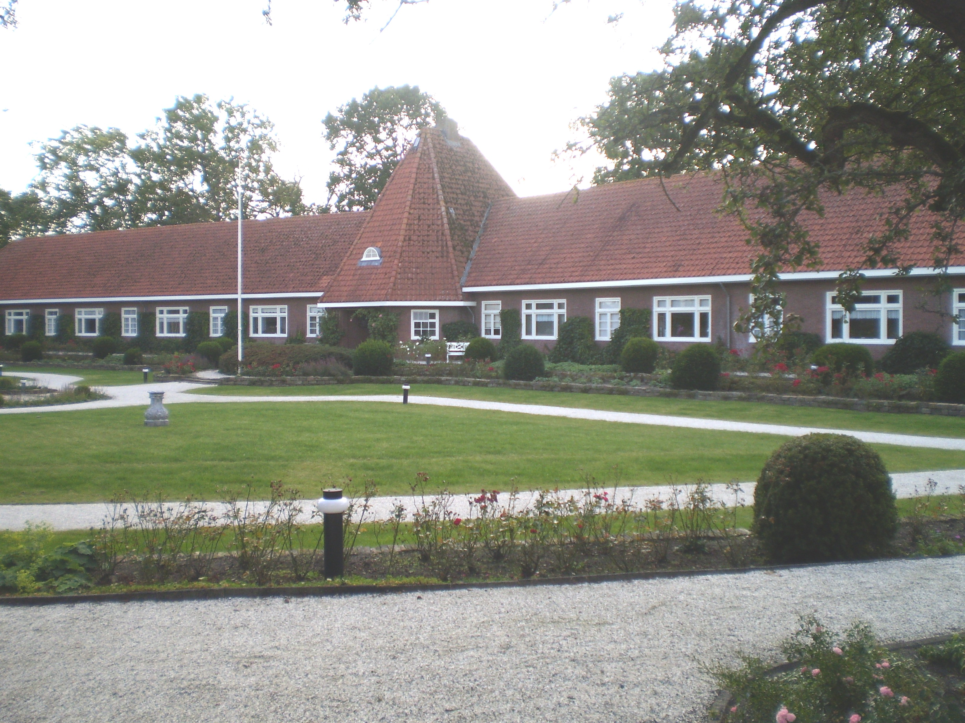 Welgelegen yn Akkrum.